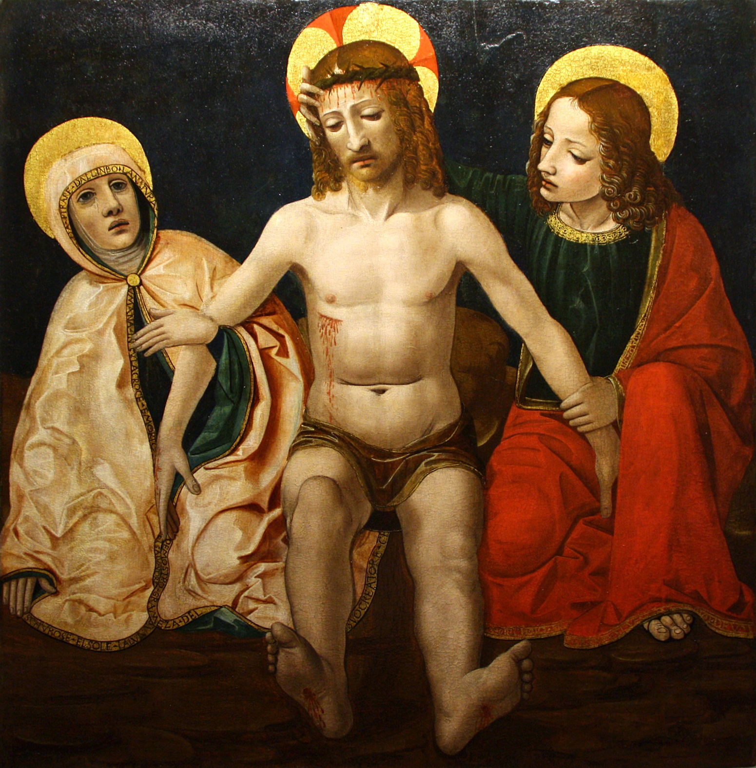 Dalla distrutta oratorio di San Rocco della chiesa di Madonna di Campagna a Verbania, poi nella Chiesa Parrocchiale dei SS.Giovanni e Paolo di Vezzo.]